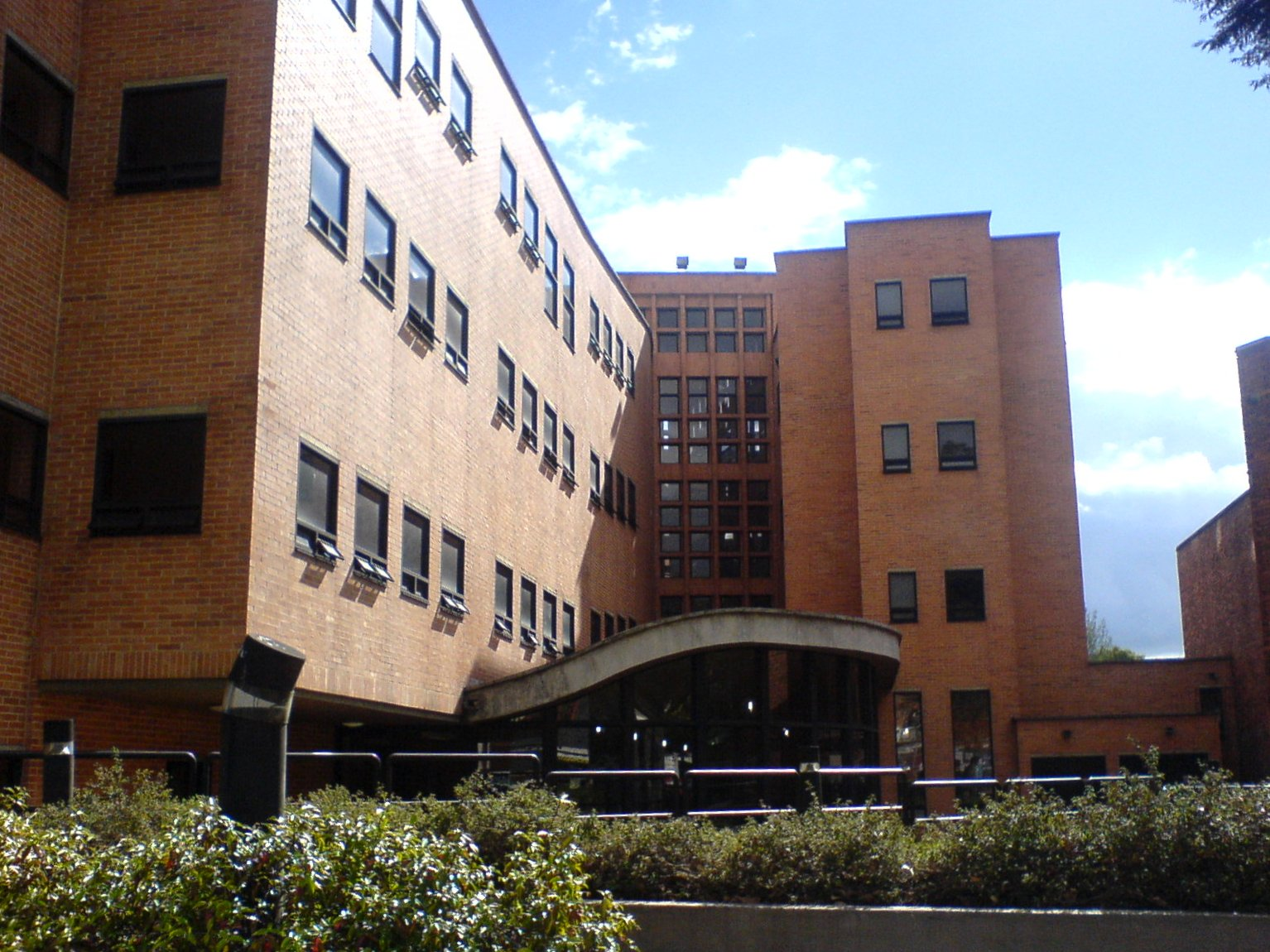 Facultad de Ciencias Economicas (FCE)